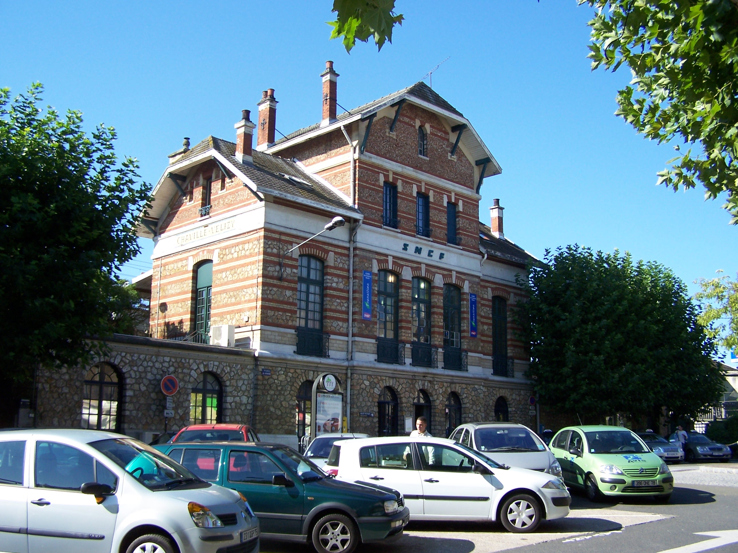 Gare de Chaville-Vélizy à Viroflay (Yvelines, France)